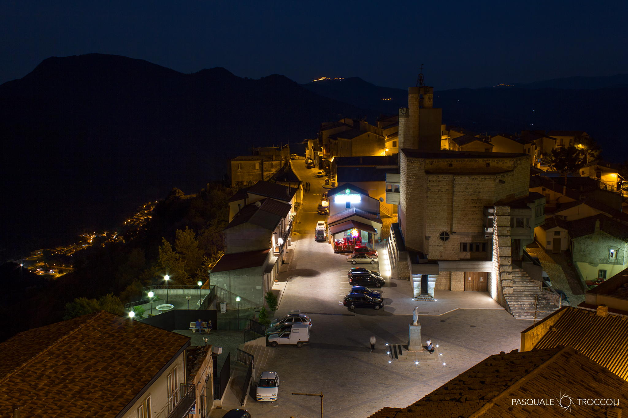 Piazza Elena con la nuova illuminazione